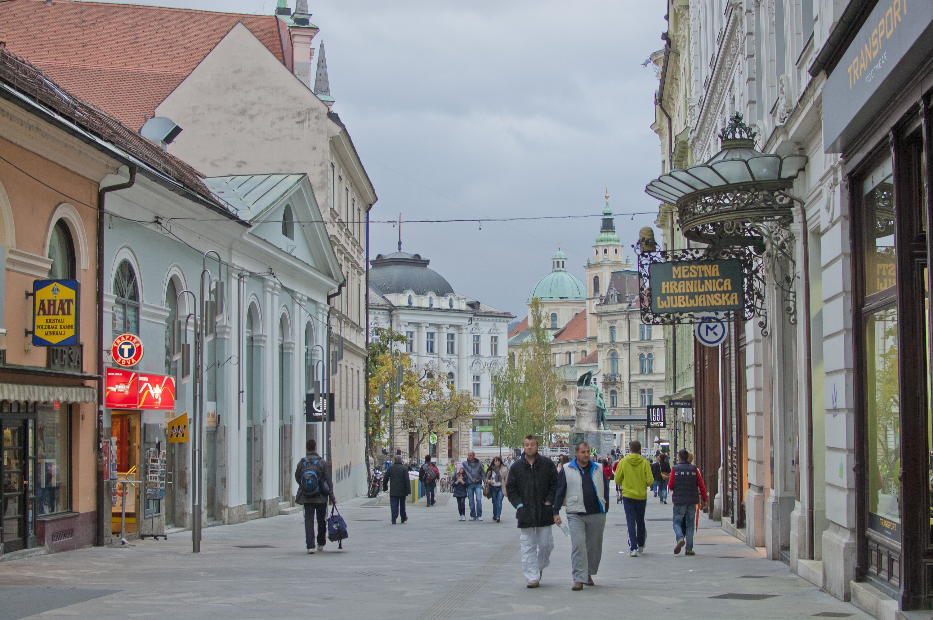 @ Ljubljana, Slovenia